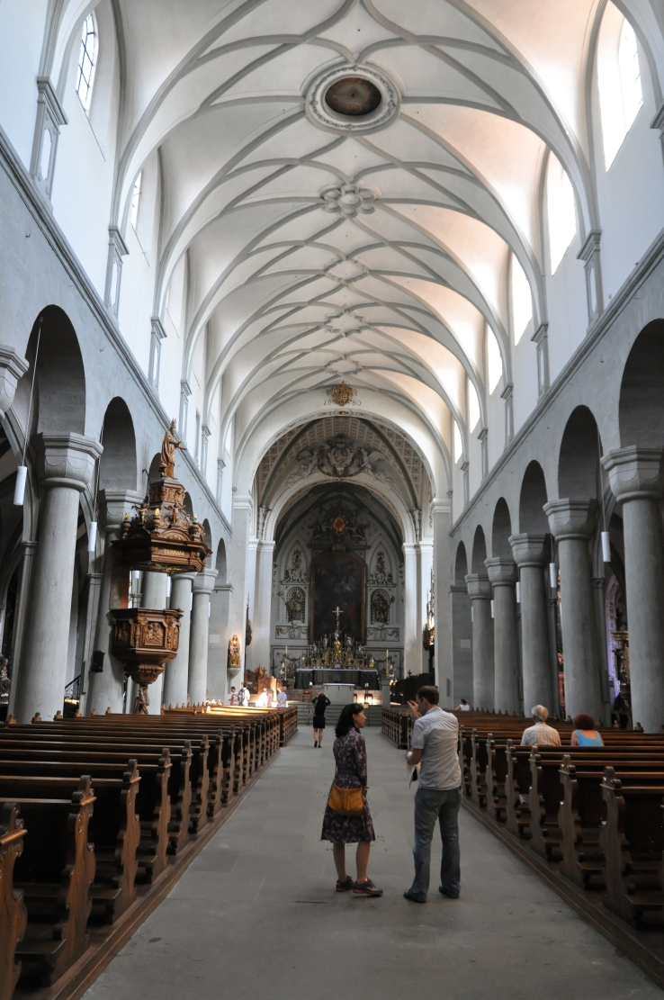 Konstanzer Münster 2012